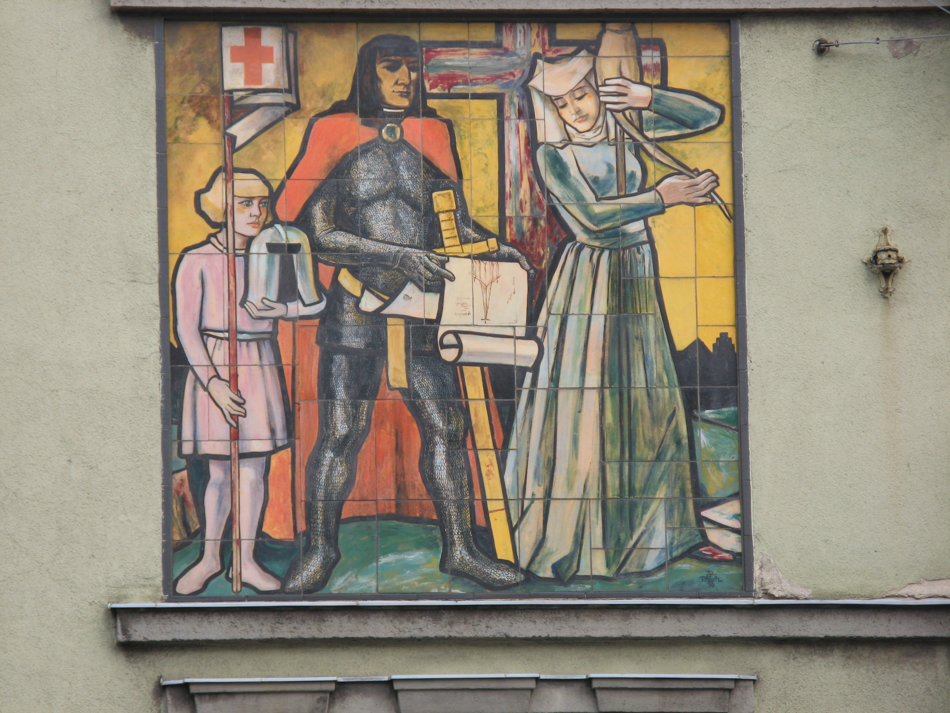 Kachelbild "Spinnerin am Kreuz" (um 1938) an der Wohnhausanlage Triester Straße 85, Wien-Favoriten